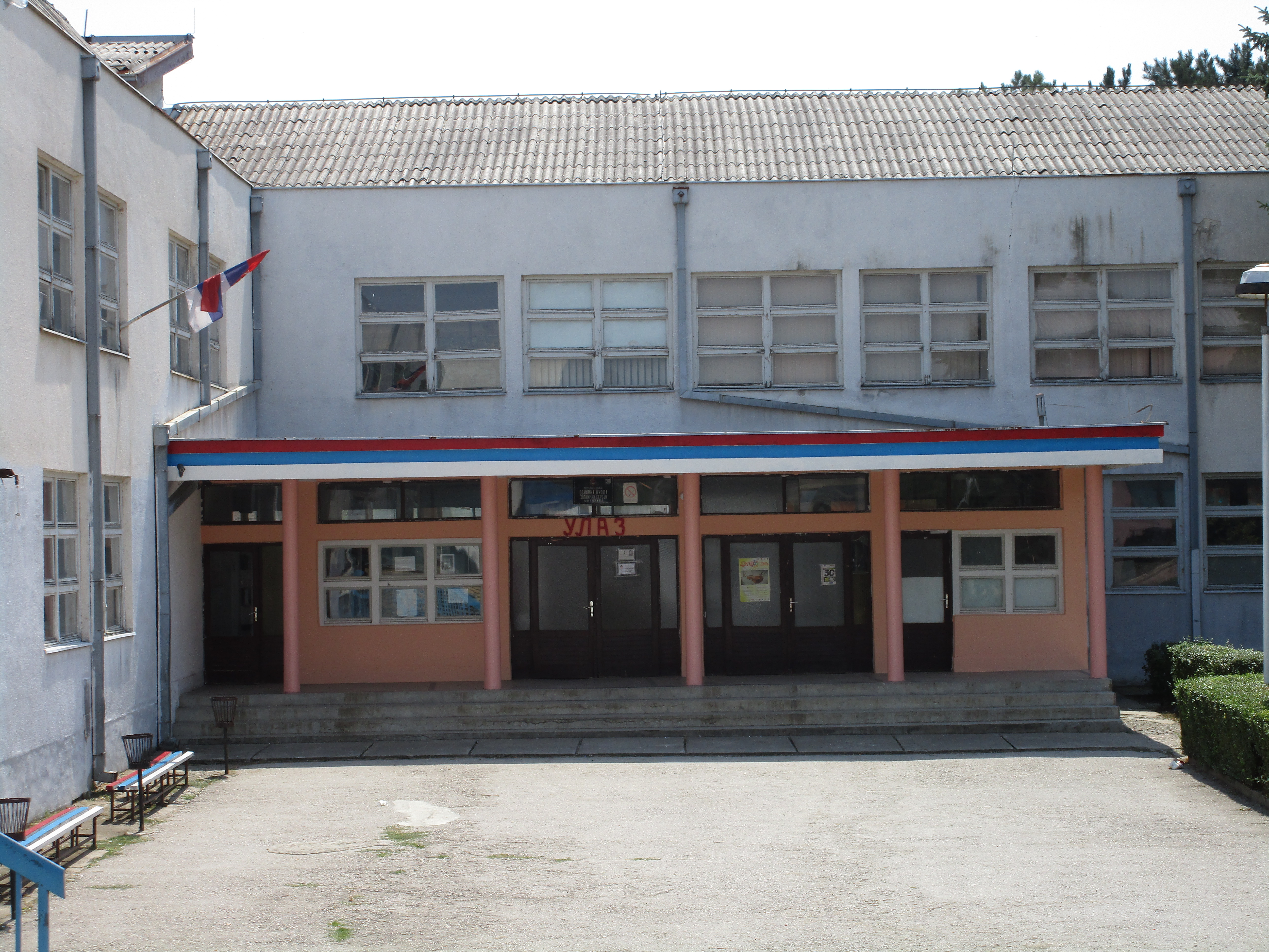 Srpski (latinica): Osnovna škola Toplički heroji, Žitorađa